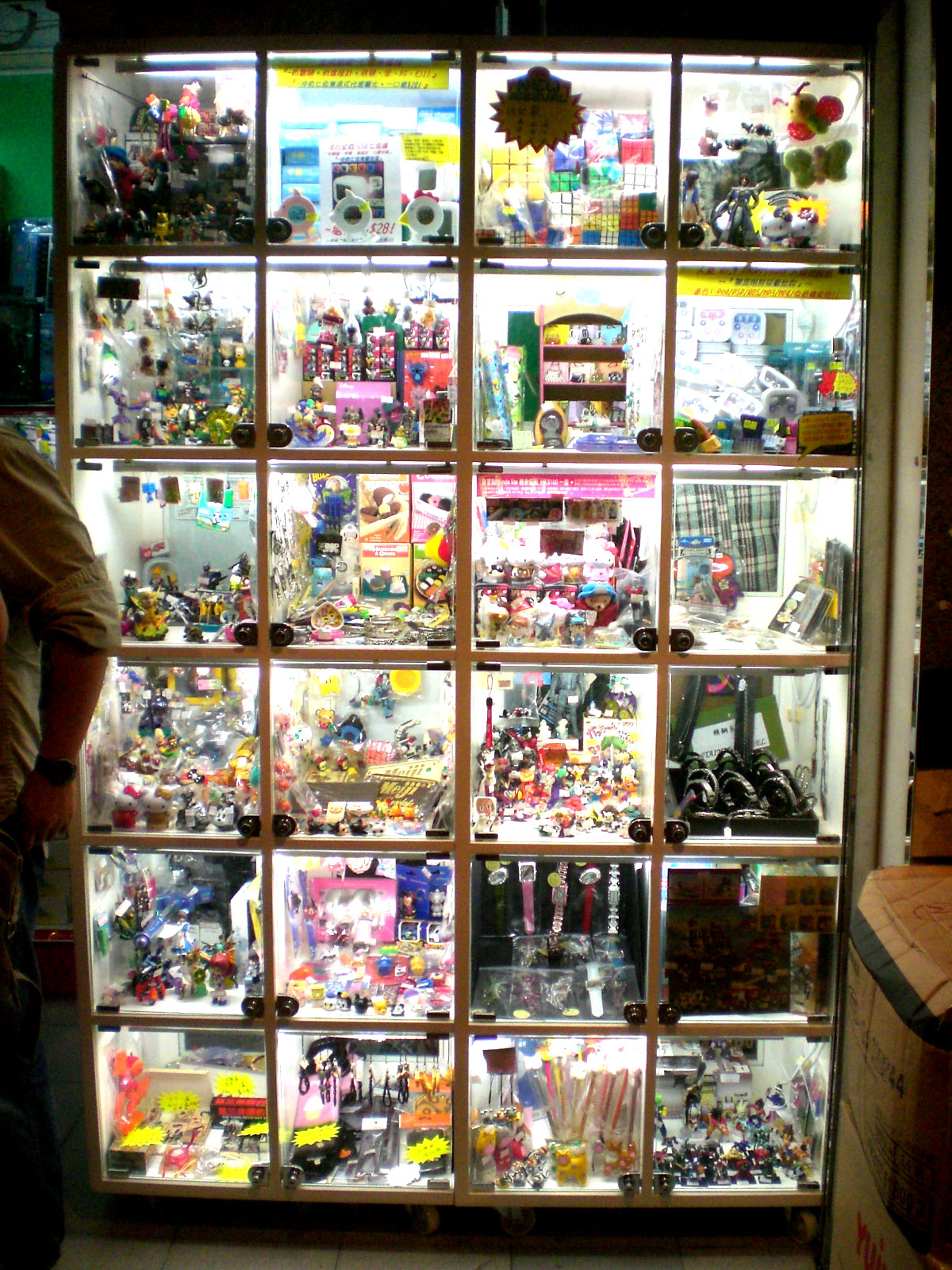 灣仔英皇集團中心商場格仔店